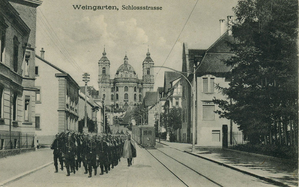 Weingarten (Württemberg). Schloßstraße (heute Abt-Hyller-Straße) mit Soldaten und „Bähnle“ (1910 elektrifiziert).